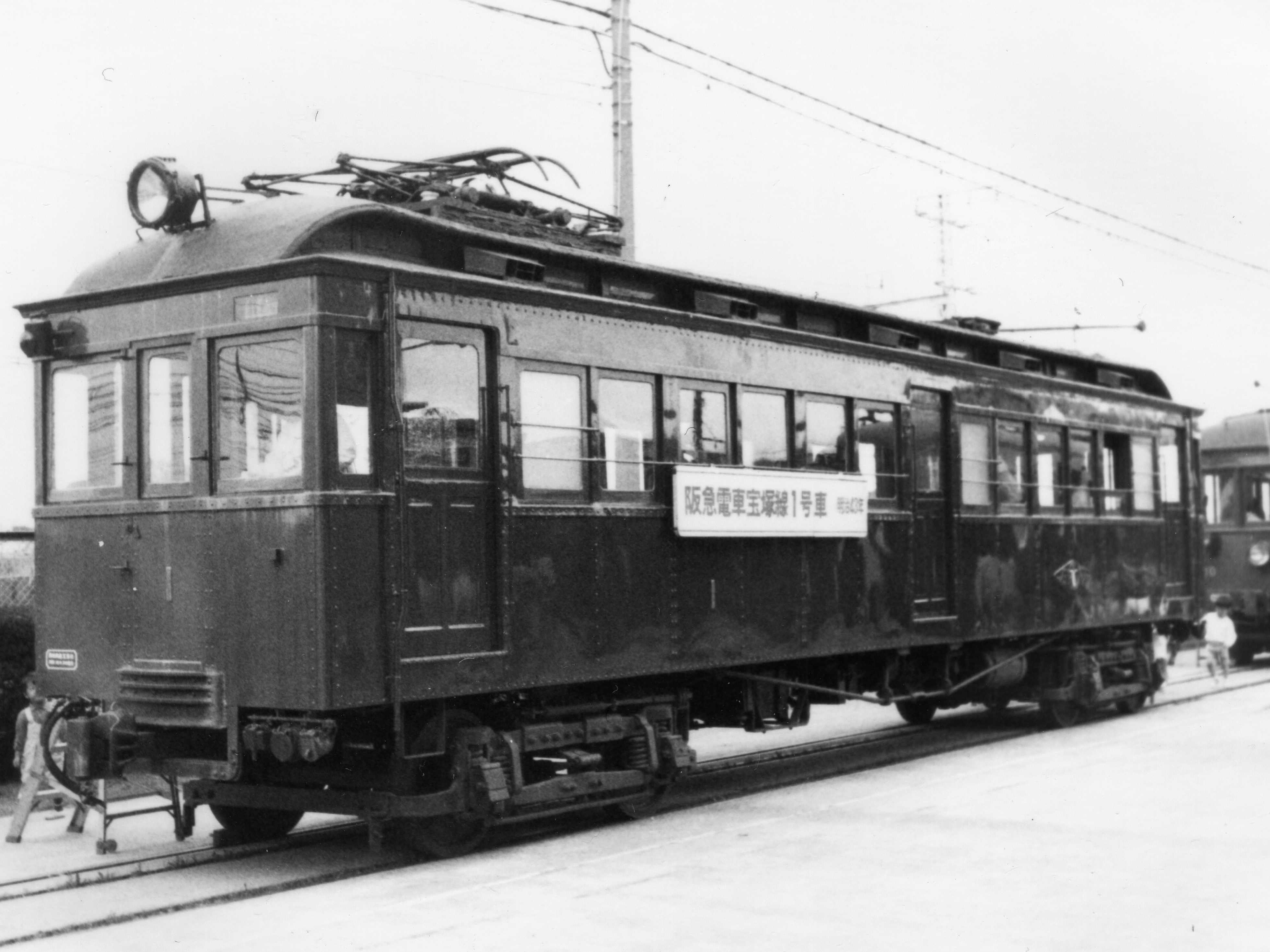 正雀に戻った1